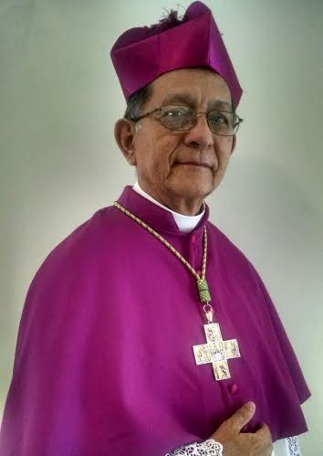 Monseñor Torres